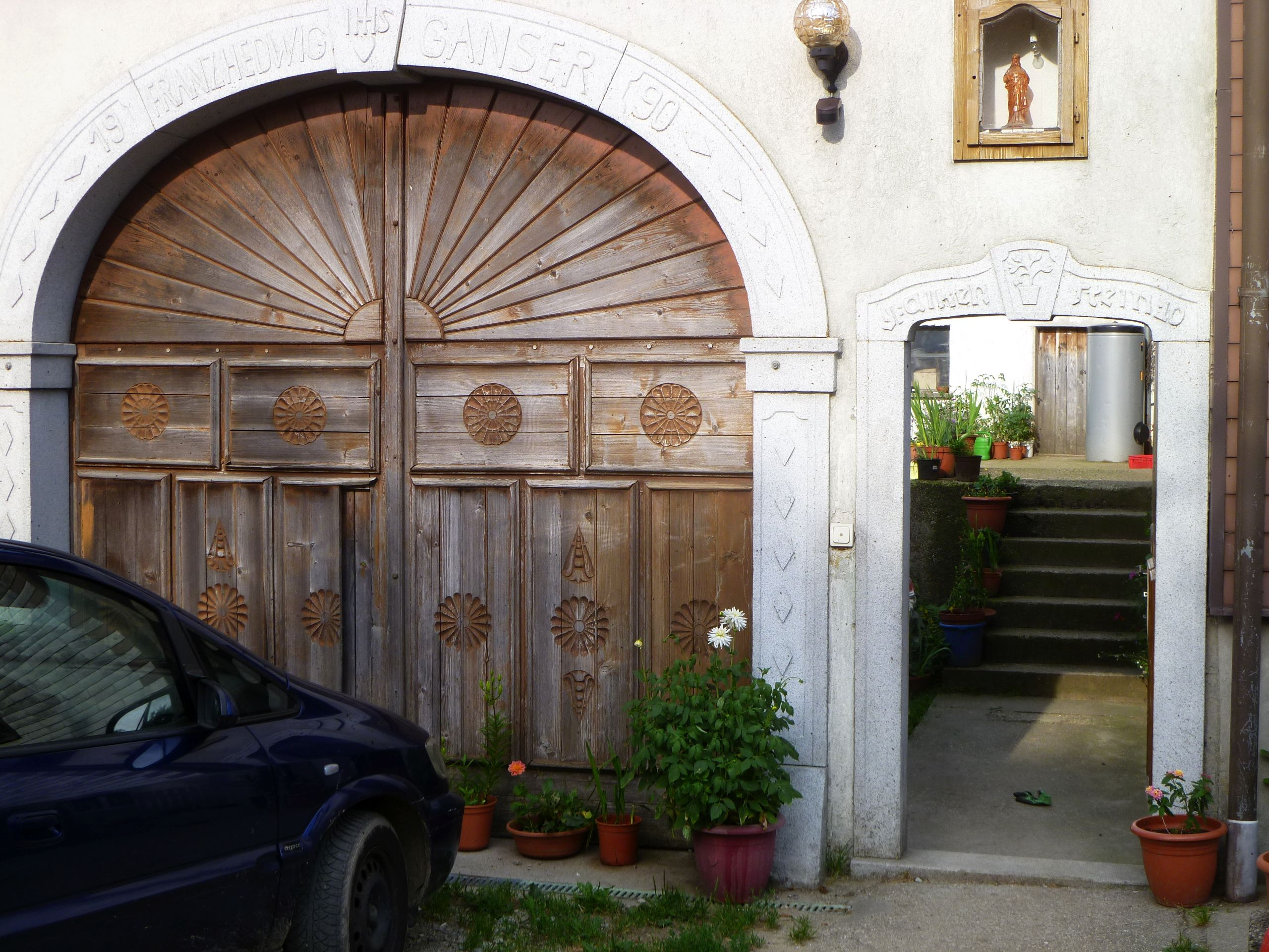 Edelsitz Leithen (heute Bauernhof Ganser Portal)